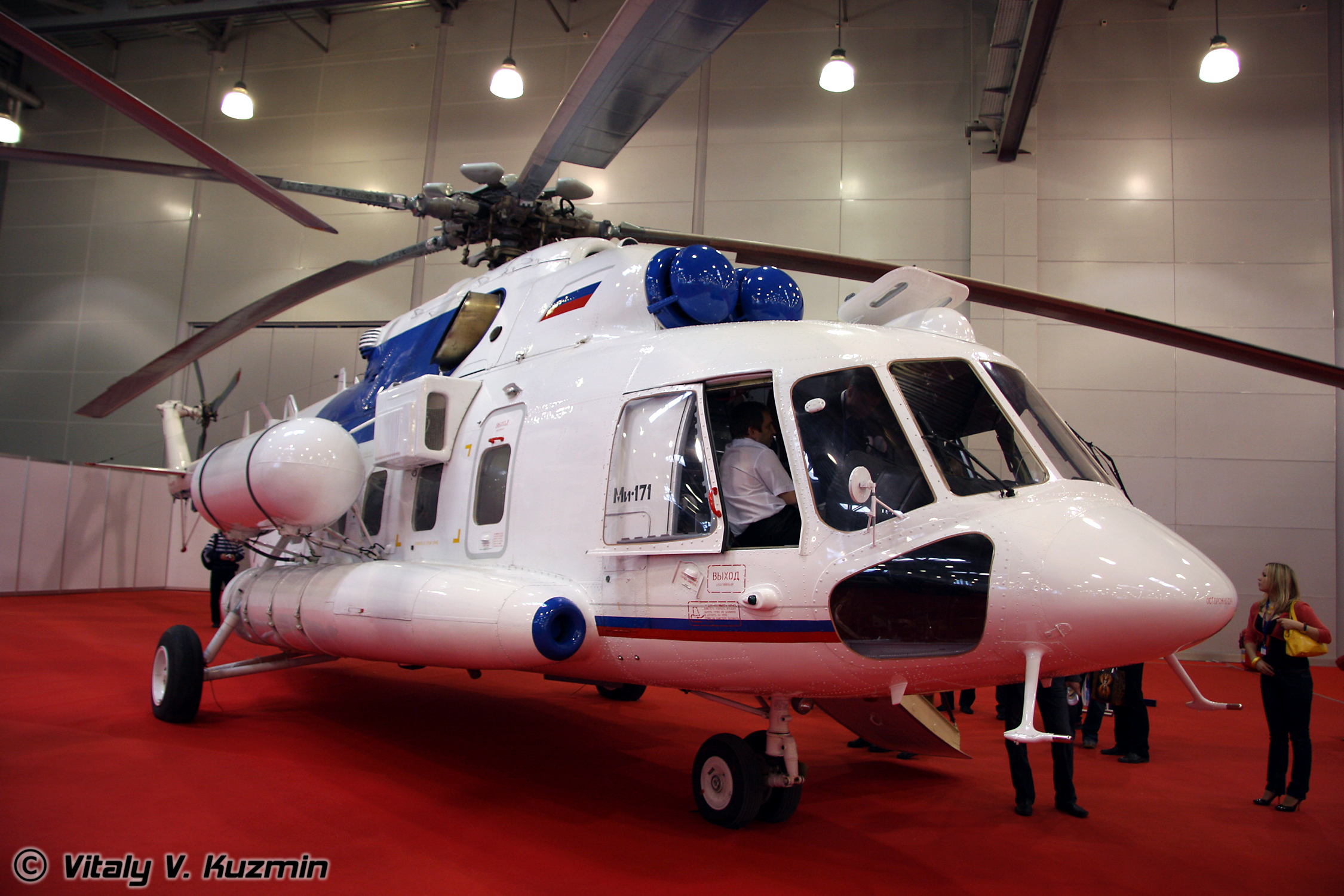 Ми-171 (Mi-171)